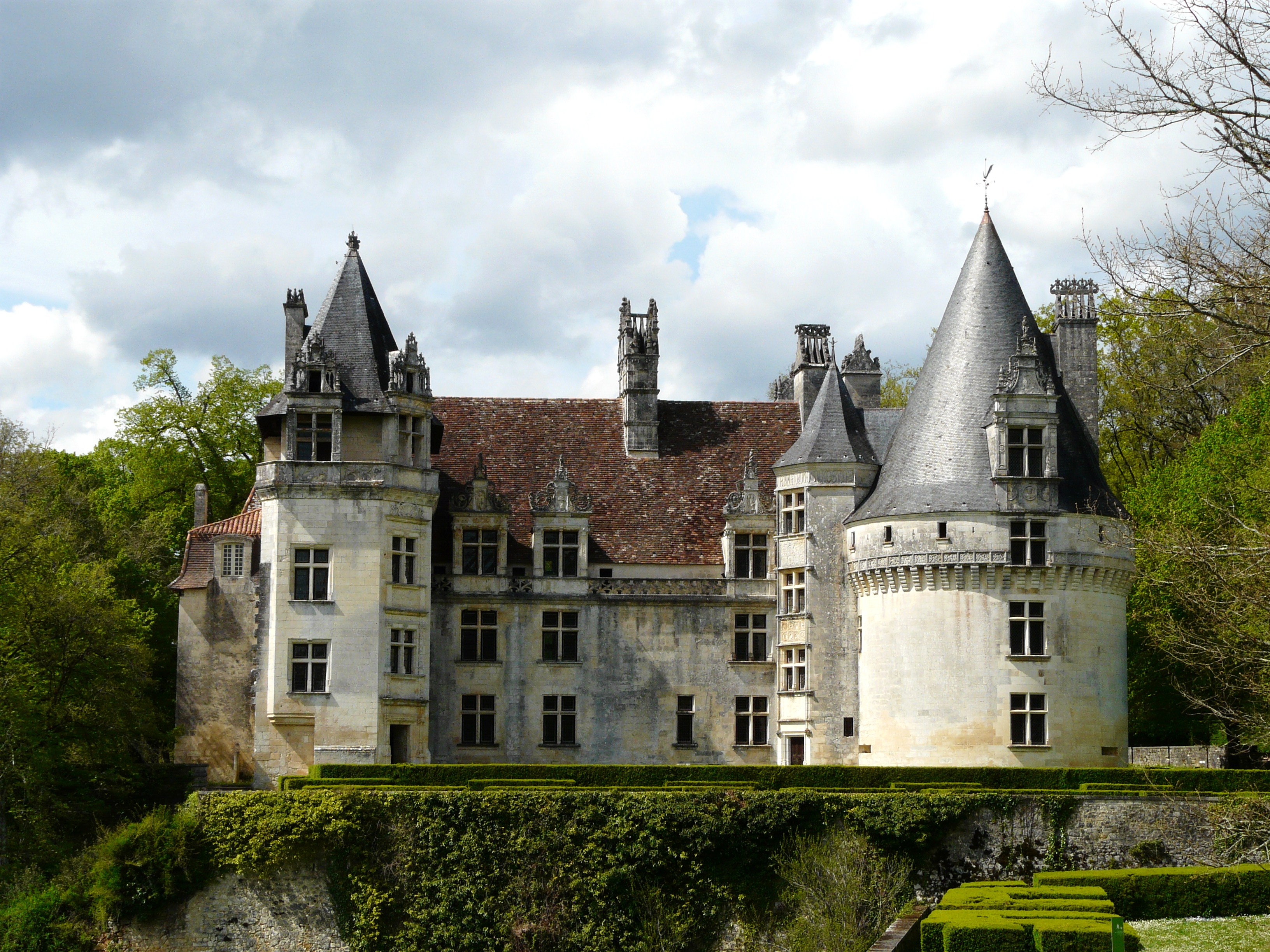 Le château de Puyguilhem, Villars, Dordogne, France Object location45° 25′ 33.6″ N, 0° 44′ 39.5″ E